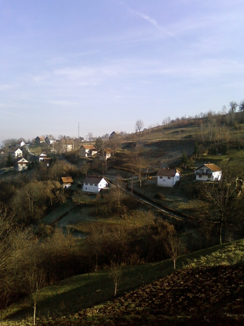 Šipovik